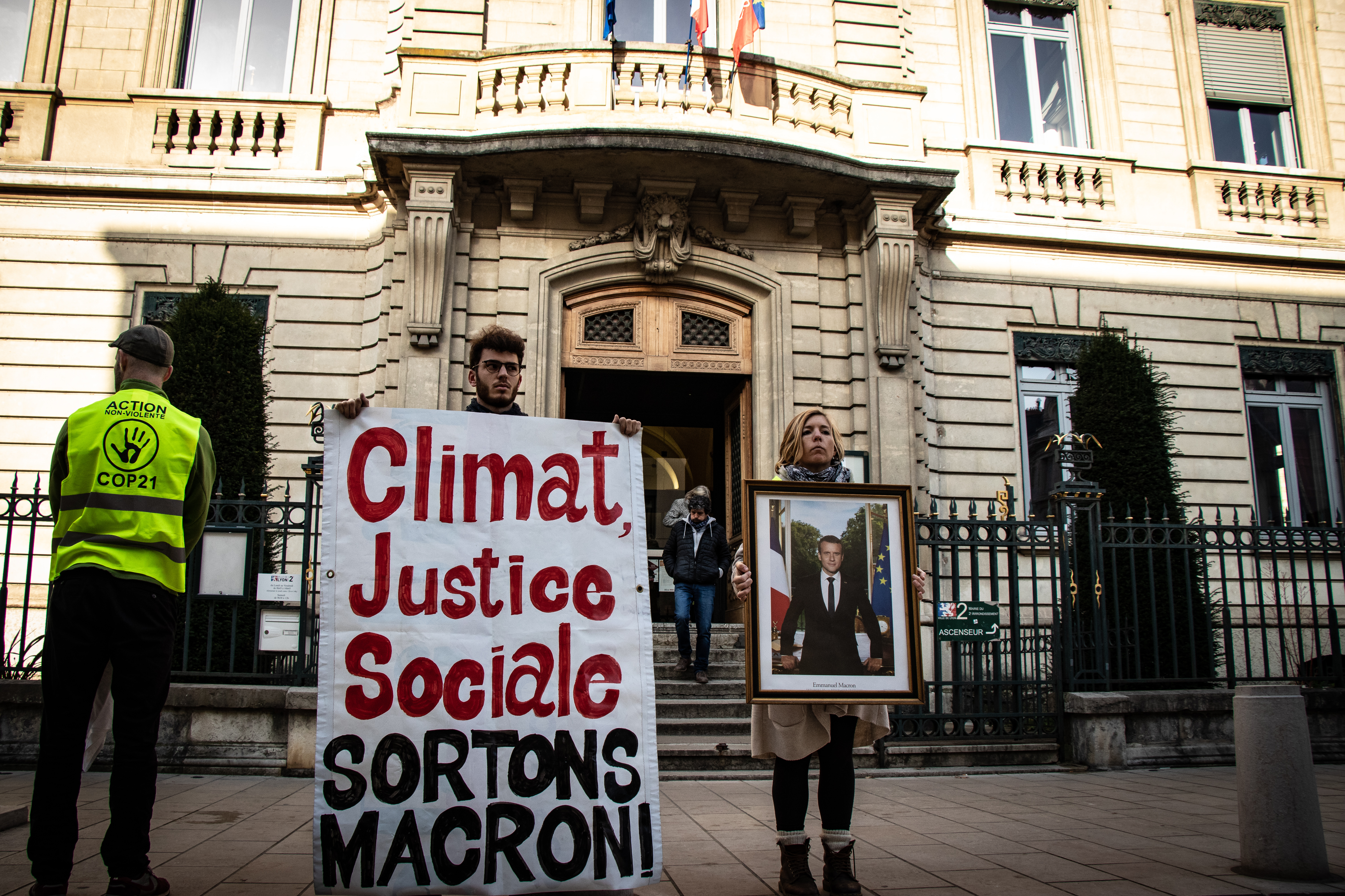 Trois activistes d'ANV-COP21 posent devant une mairie de Lyon le 21 février 2019 après avoir décroché le portrait présidentiel d'Emmanuel Macron pour dénoncer son inaction climatique